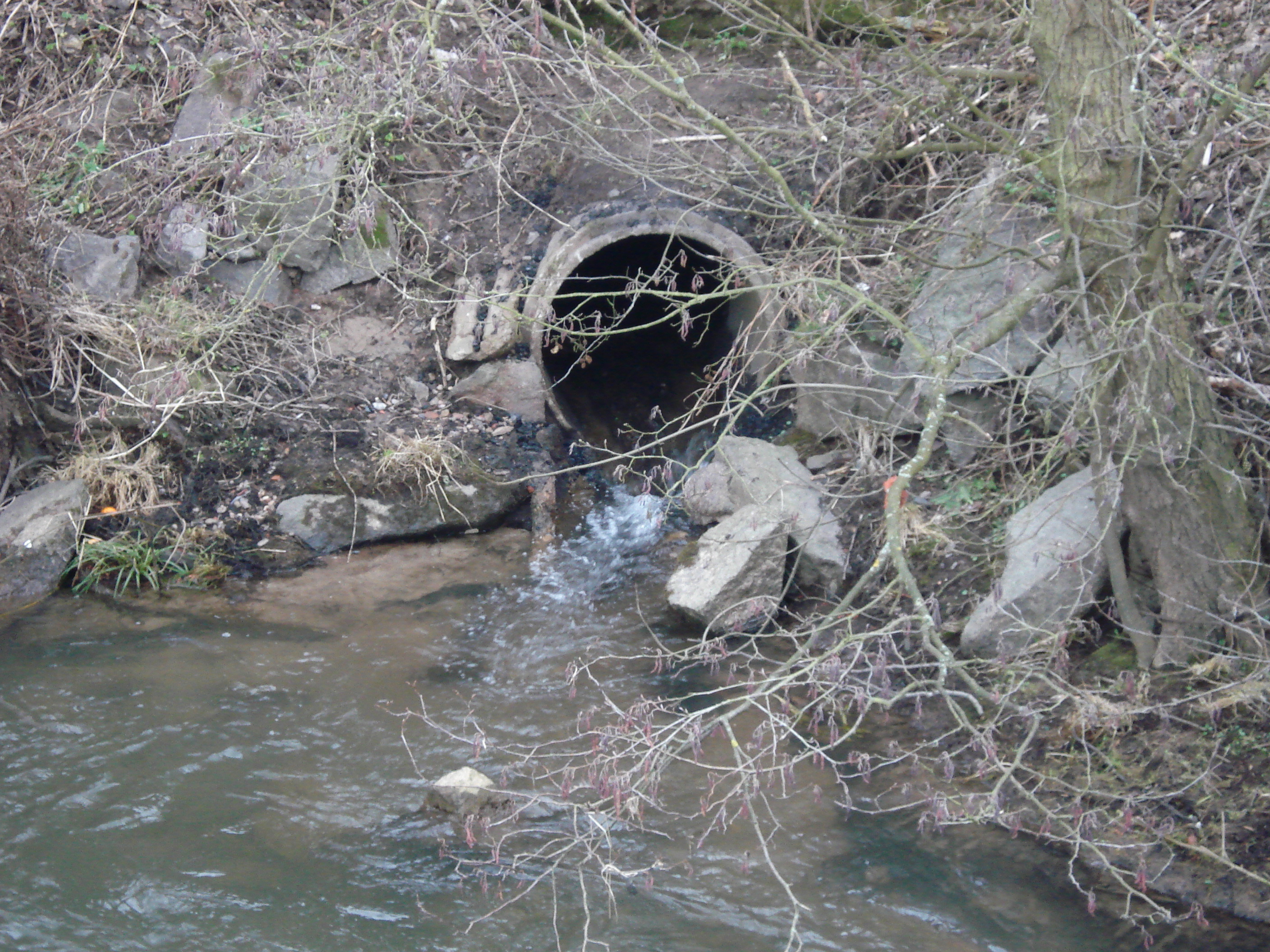 Der Hemsbach mündet in die Kahl